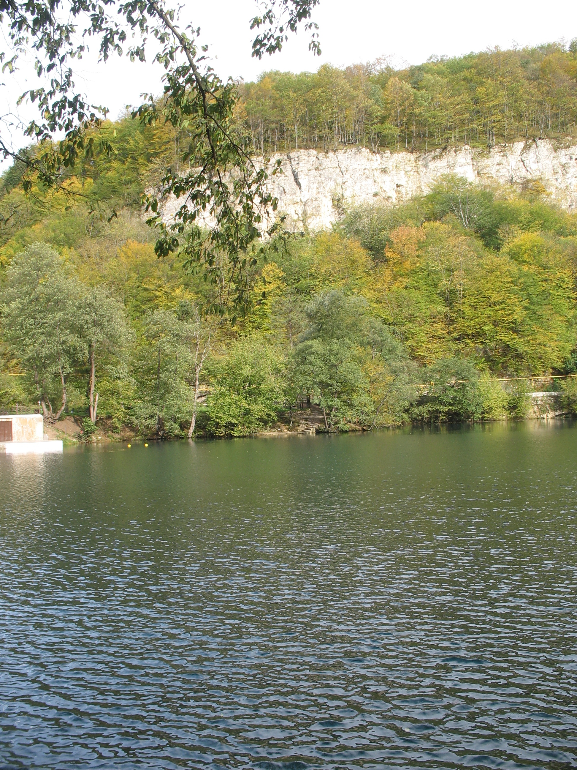 Нижнее голубое озеро в Кабардино-Балкарии в октябре 2007 г.